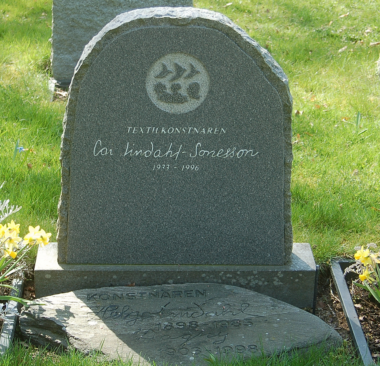 Minnesvård för konstnären Cai Lindahl-Sonesson 1933-19965 vid Hammarö kyrkogård.